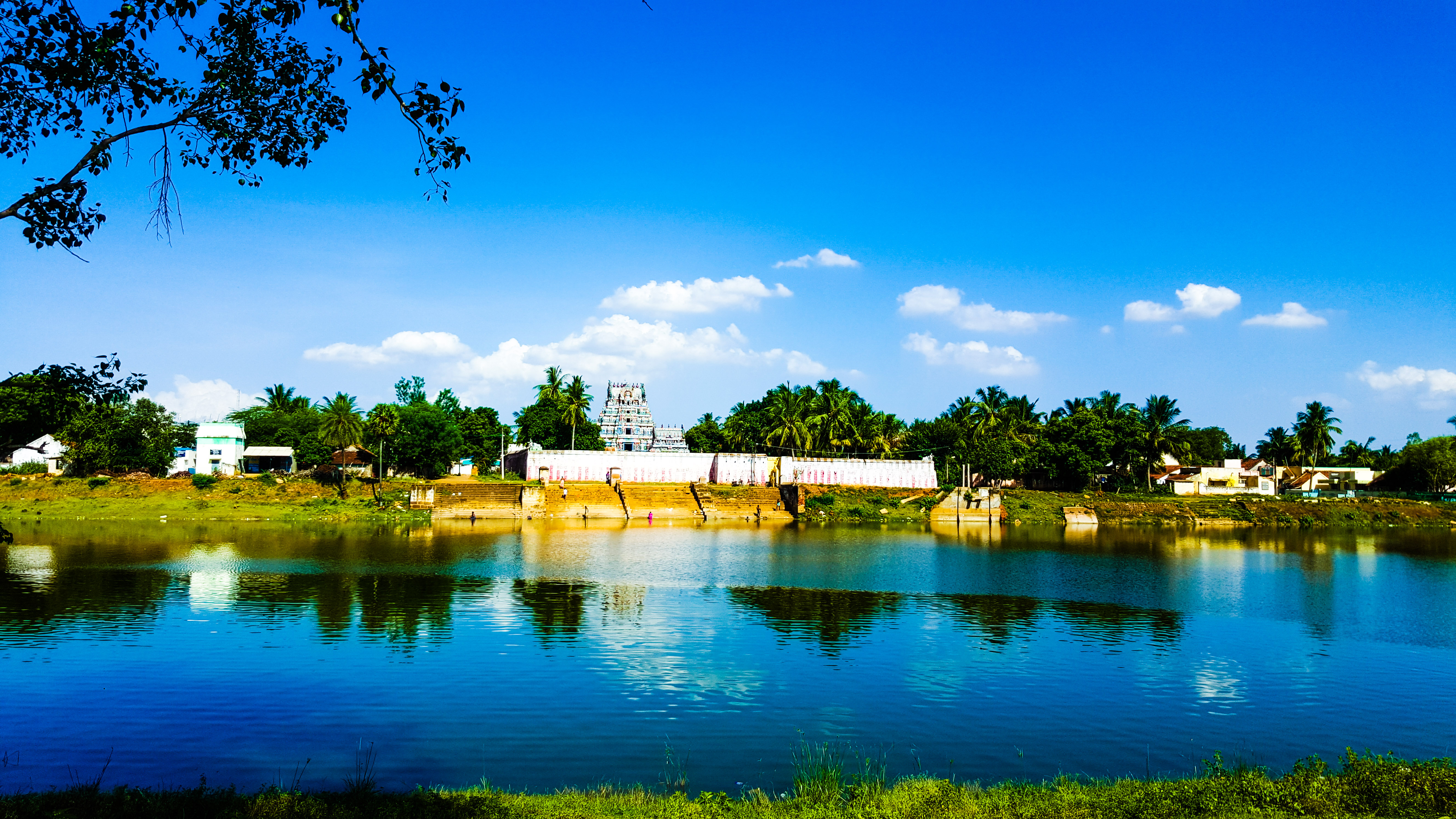 Backside lake view of Thiruvarankulam Arangulanathar temple